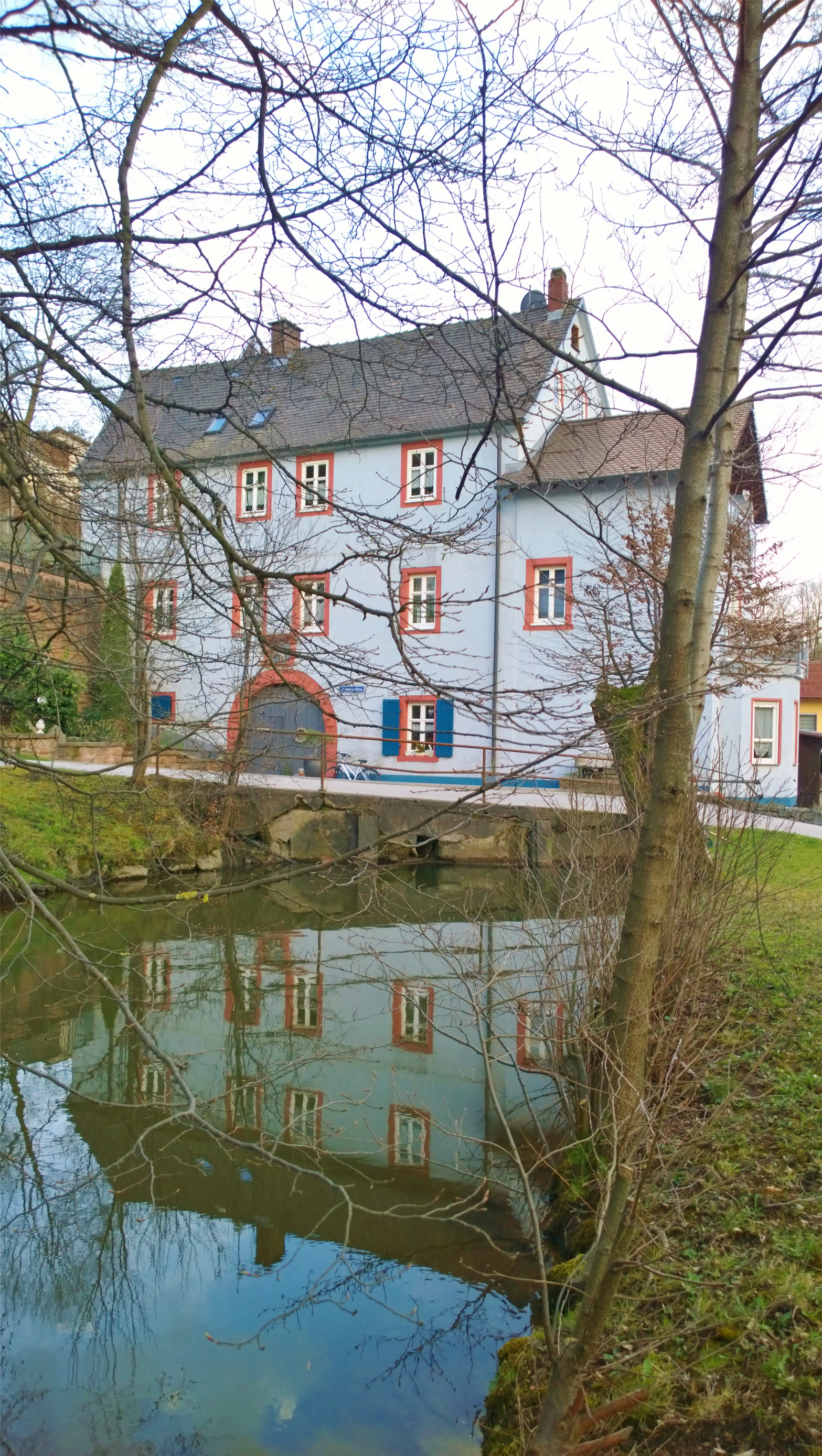 Wald-Michelbach: Hammerschlösschen, Zustand März 2015, Blick von Norden